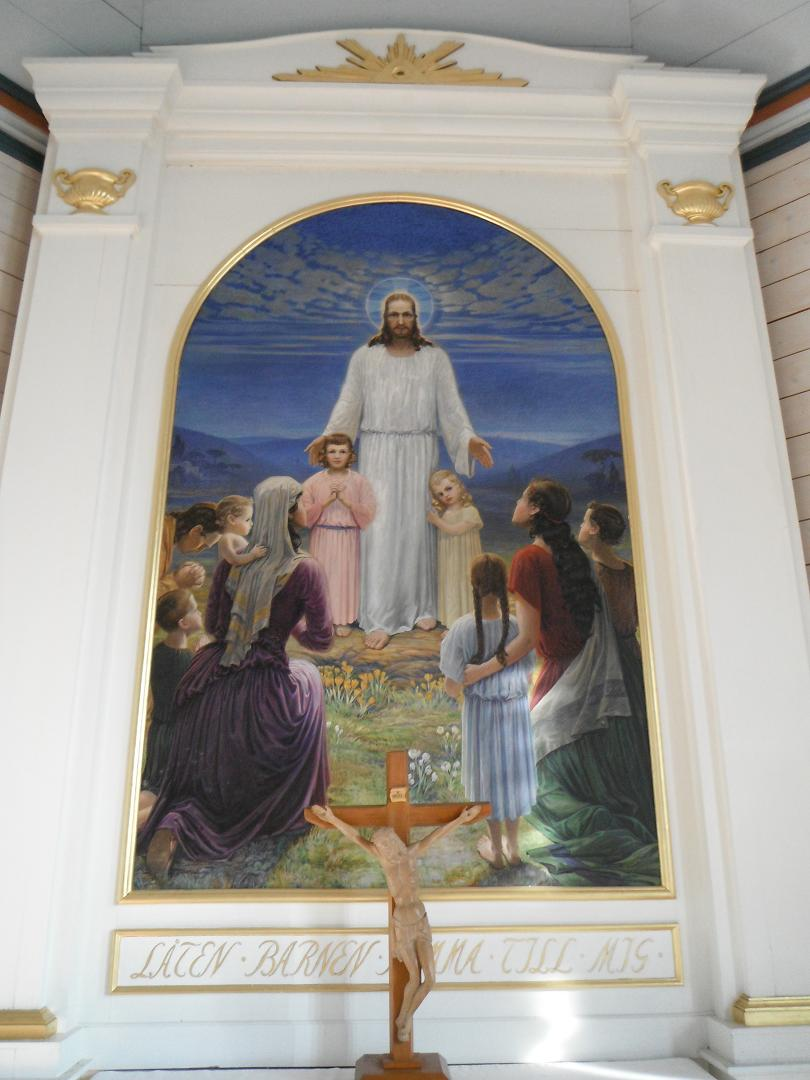 Älvsereds kyrka interiör målad av John Hedaeus